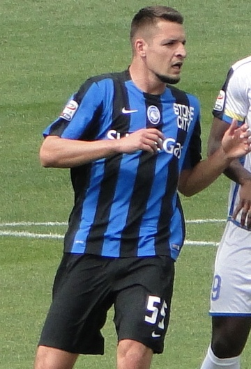 Berat Djimsiti, calciatore albanese